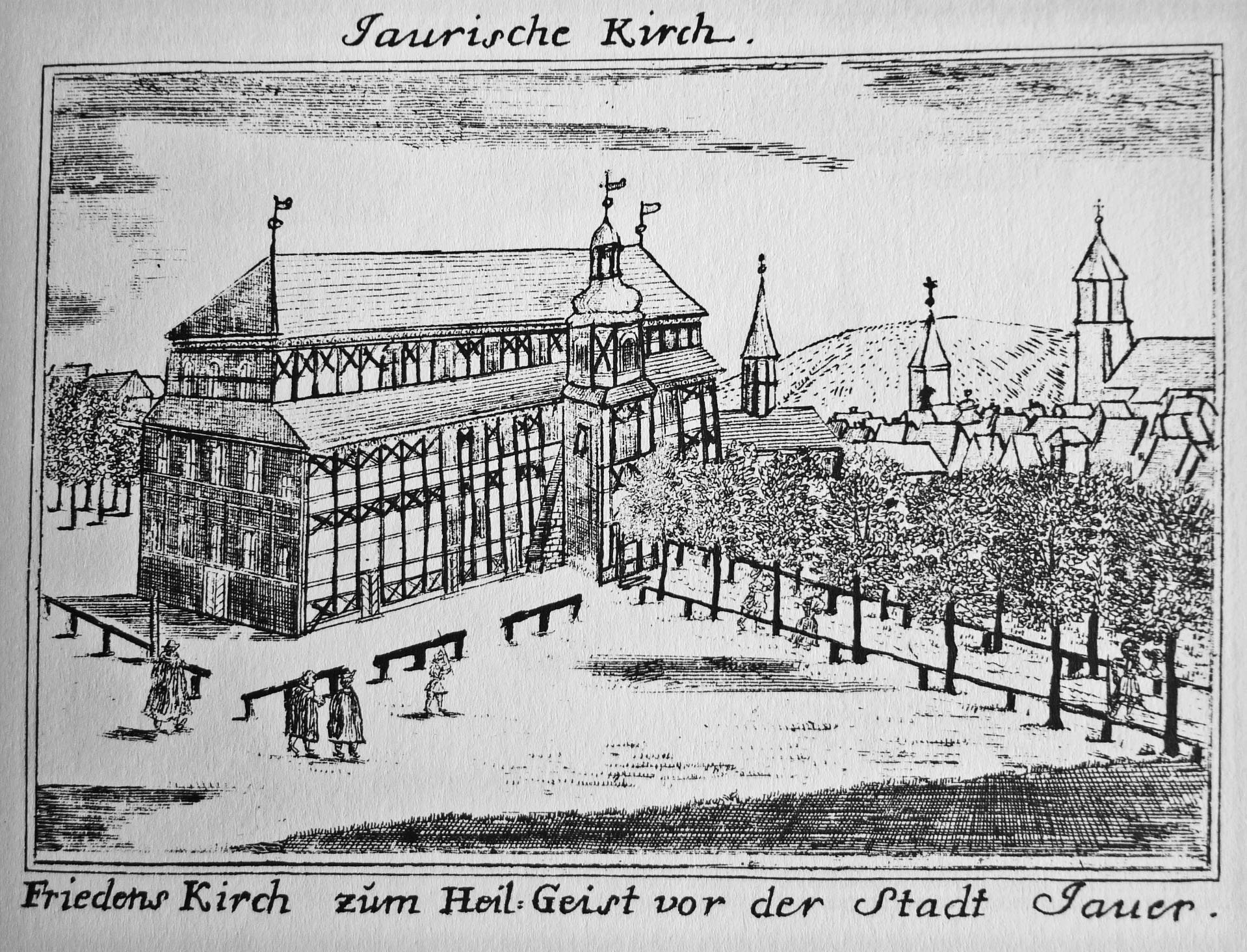 Friedenskirche in Jauer (Schlesien) aus Friedrich Bernhard Werner: Schlesische Bethäuser (1748-52)